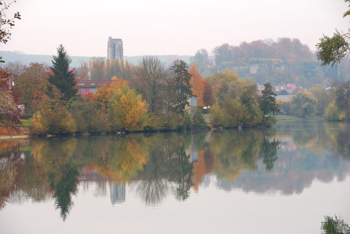 Bord de Marne à Château-Thierry. Eglise St-Crépin et partie du château fort, dominant la ville basse.